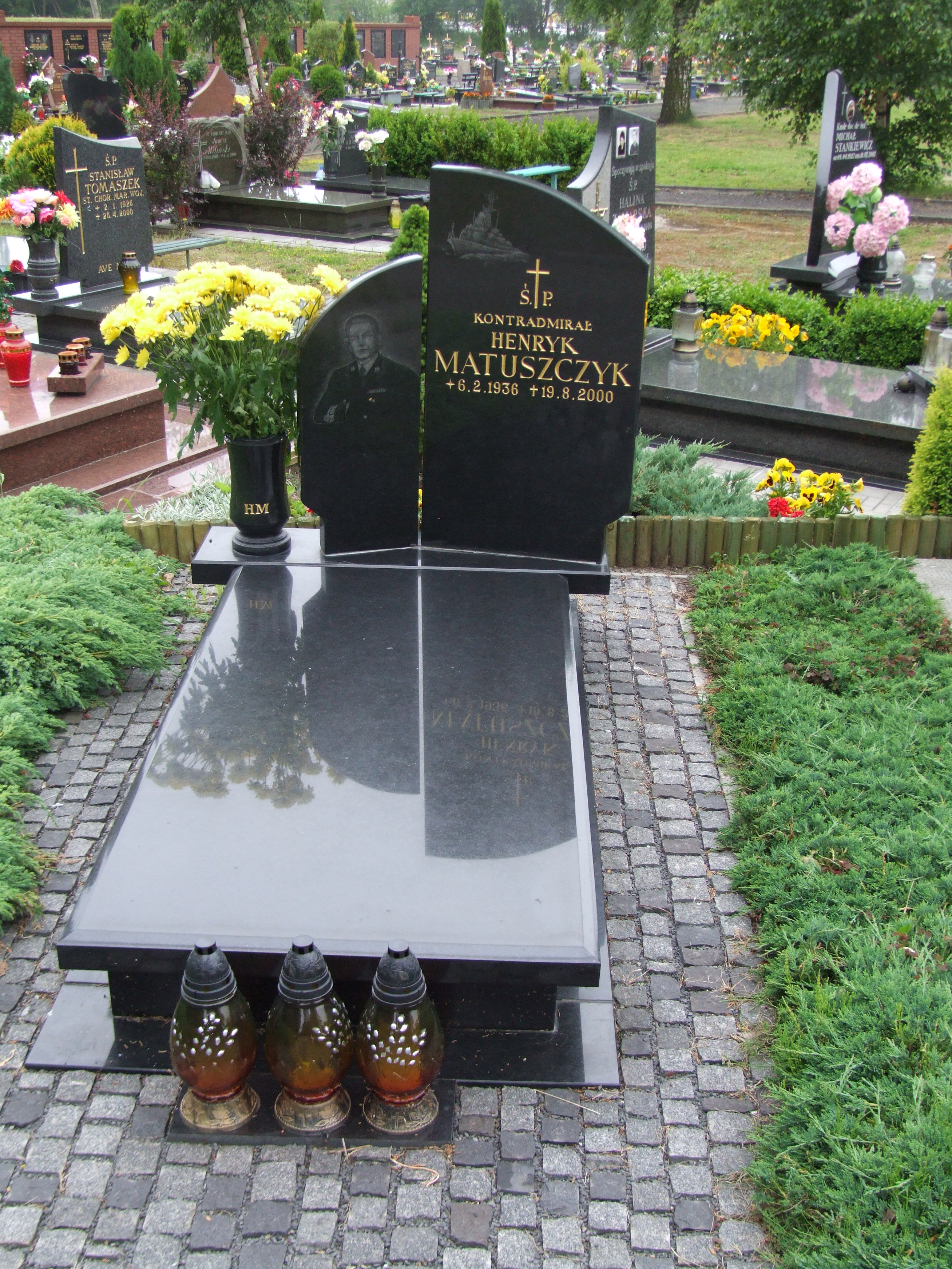 Gdynia-Oksywie Cmentarz Marynarki Wojennej